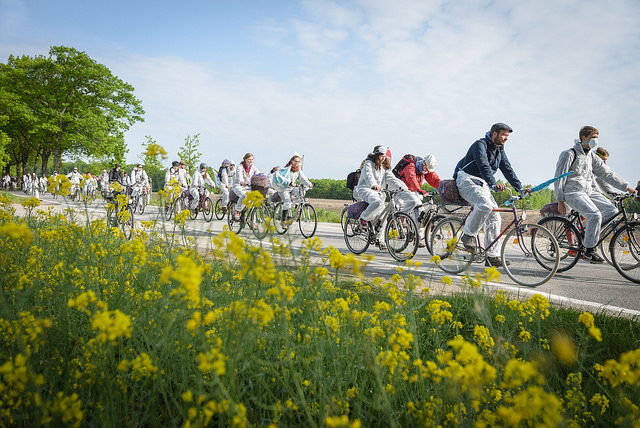 Der "Fahrradfinger" radelt zur Blockade am Kraftwerk